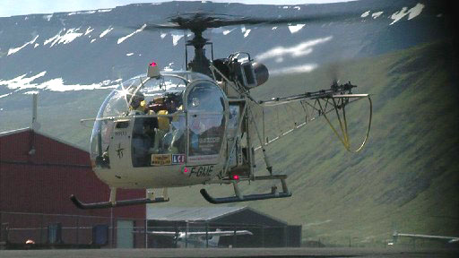 Alouette II N°1003, Paris-Oshkosh, 1ere traversée transatlantique en Alouette II. Ici à Isafjordur (Islande)